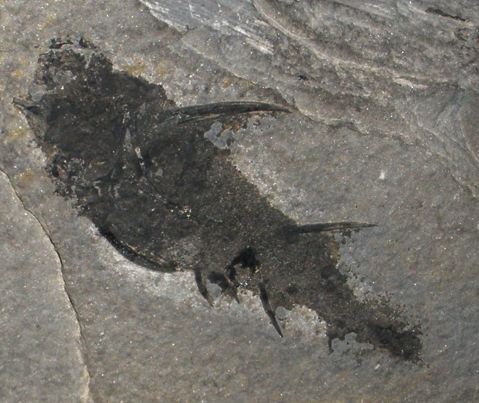 Fossil of Diplacanthus, an extinct fish- Took the photo at Fossil Show, Munchen 2011